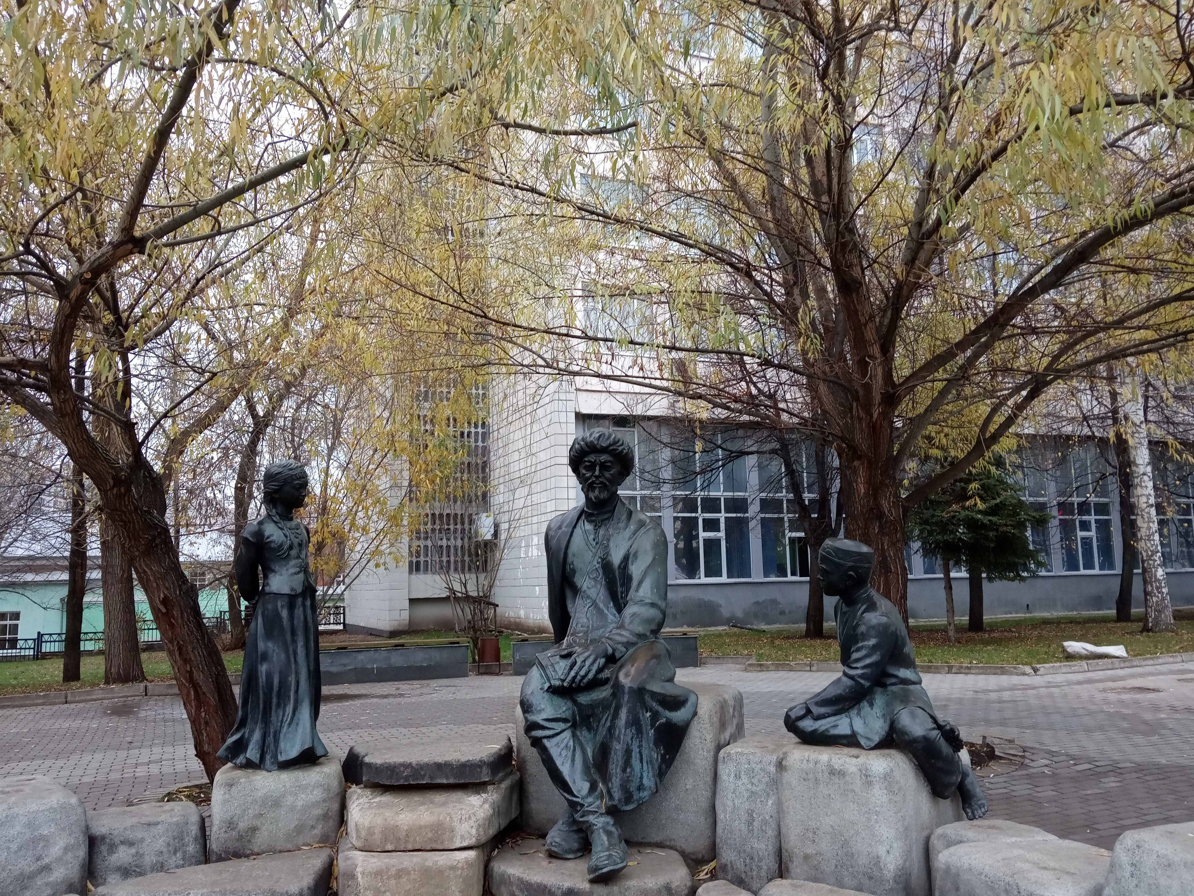 Республика Башкортостан,город Уфа